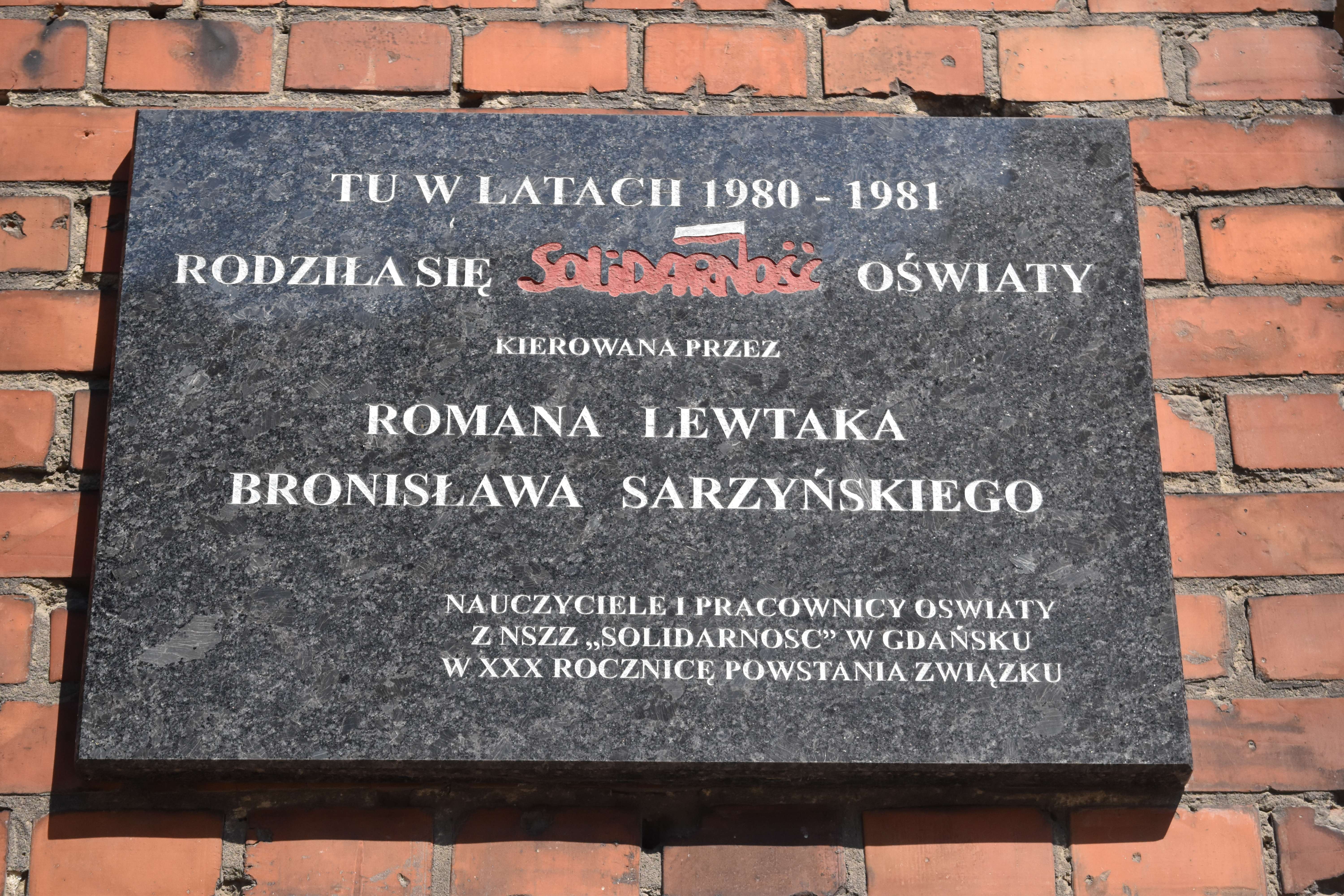 Gdańsk Stare Miasto, ul. Osiek, tablica pamiątkowa.